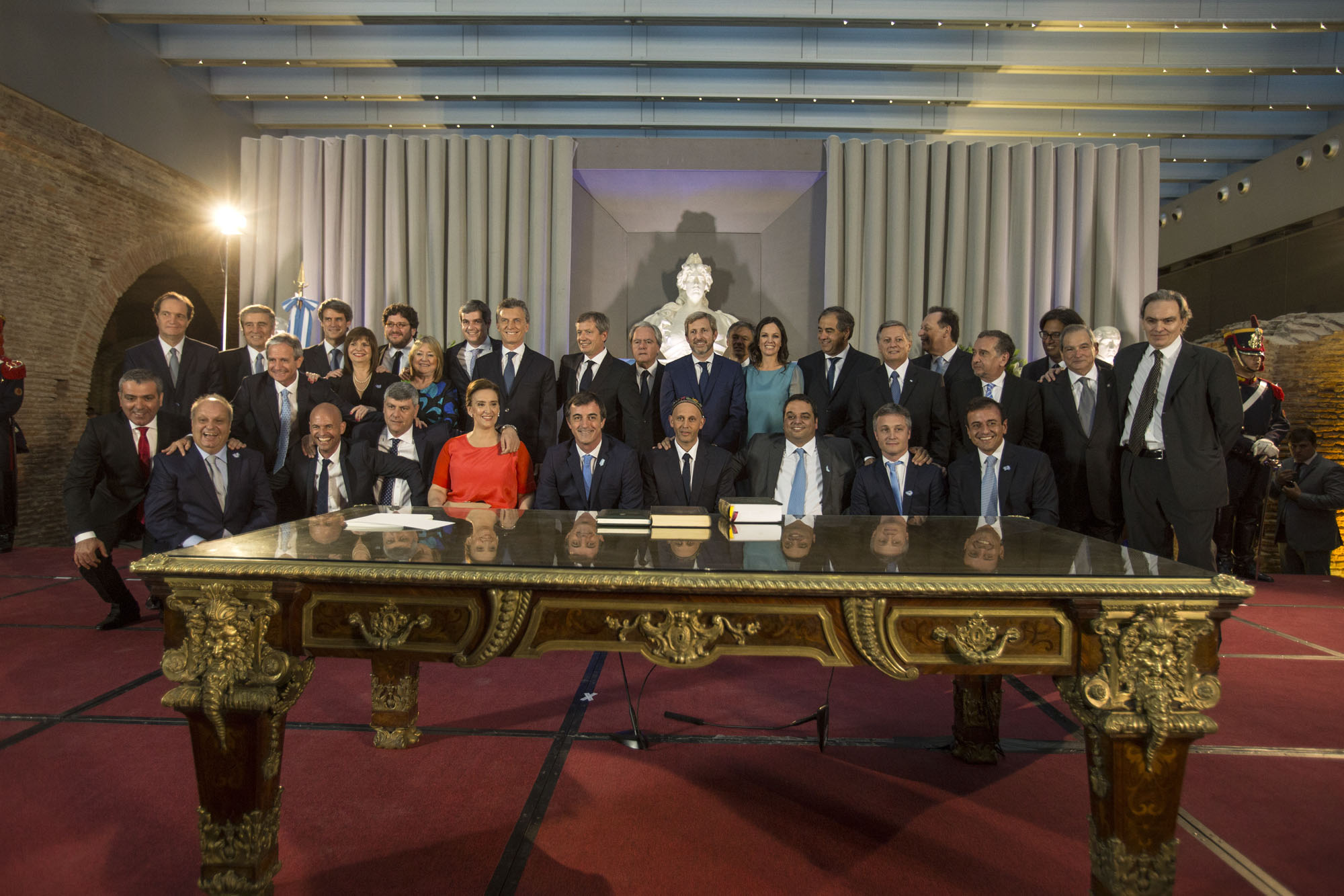 El jefe del Gabinete, los ministros y los secretarios General y Legal y Técnico juraron en una ceremonia que se desarrolló en el Museo del Bicentenario de la Casa de Gobierno.